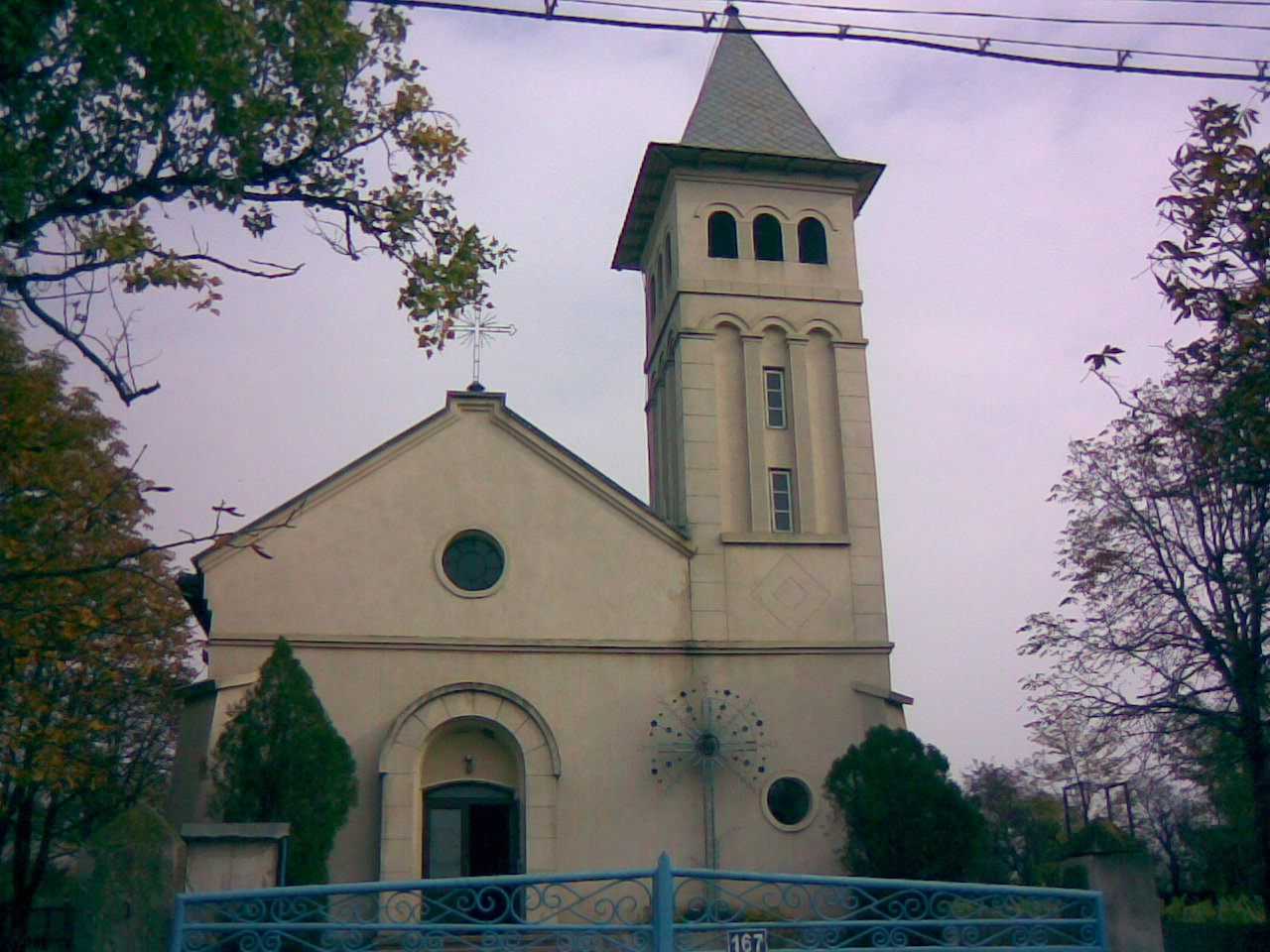 Catholic Church in Bălţaţi, Iaşi County, România